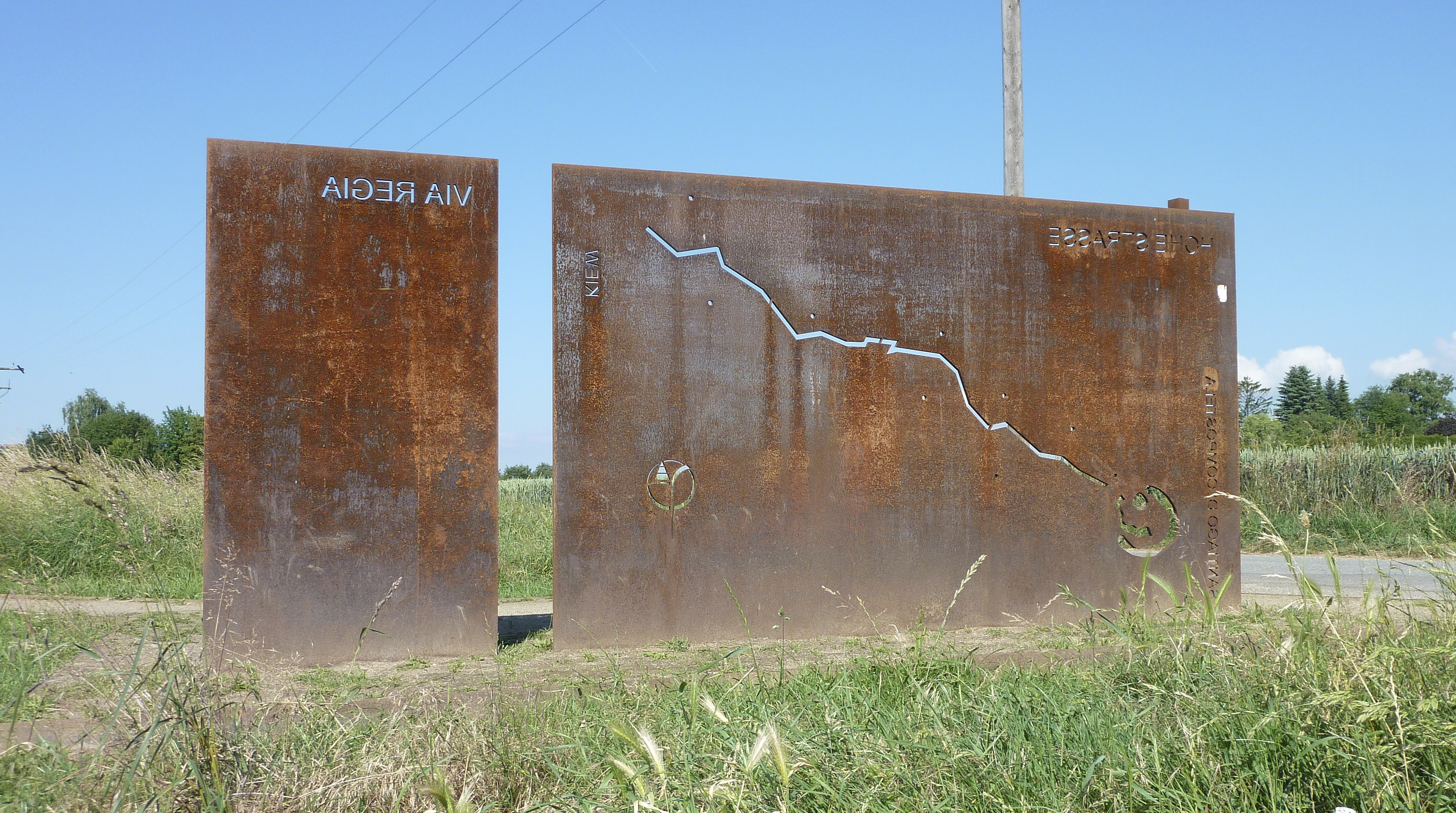 Frankfurt am Main, Stadtteil Bergen-Enkheim: Das Entrée Hohe Straße ist ein künstlerisch gestalteter Platz am östlichen Ortsausgang von Bergen. An dieser Stelle beginnt der Abschnitt eines Zweiges der Via Regia, dort Hohe Straße genannt, ein Netz bedeutender historischer, transeuropäischer Fernhandelswege. Mehrere Stelen und Informationstafeln erinnern vor Ort an die Geschichte dieser Straßen. Das Foto zeigt eine Skulptur aus Stahlplatten mit Verlauf der Via Regia. Ansicht der Rückseite